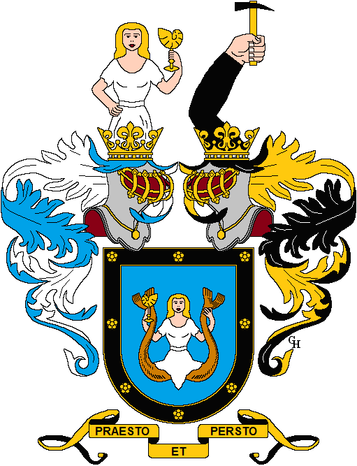 Wappen des Wiener Silberschmieds und Hoflieferanten Josef Carl Klinkosch (1822–1888), verliehen anlässlich seiner Erhebung in den österreichischen Ritterstand 1879. Zeichnung von Gerd Hruška ( Für weitere Informationen zu dieser Standeserhebung siehe (